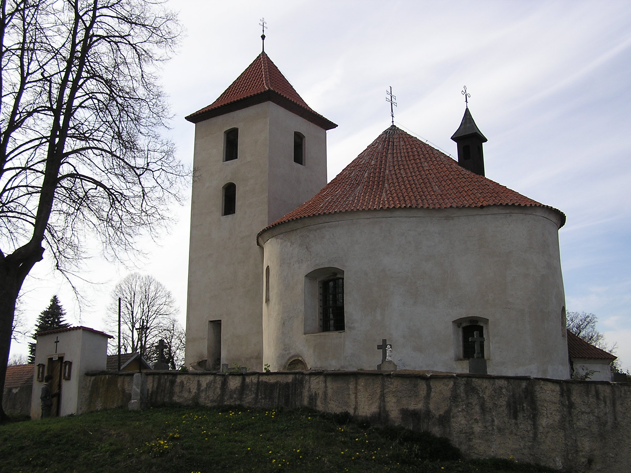 Kostel v Libouni